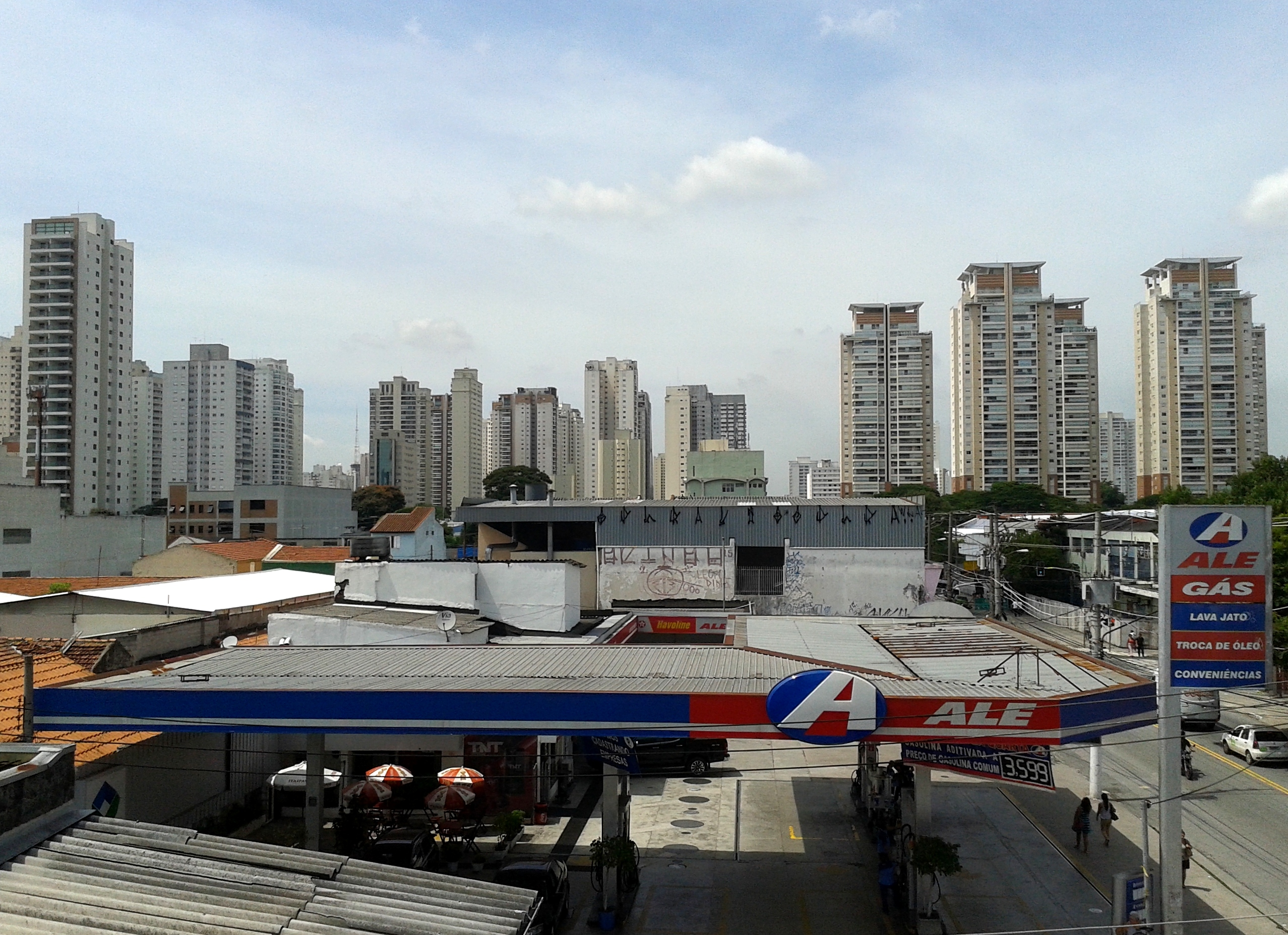 Vista do distrito da Vila Leopoldina. São Paulo, SP, Brasil.